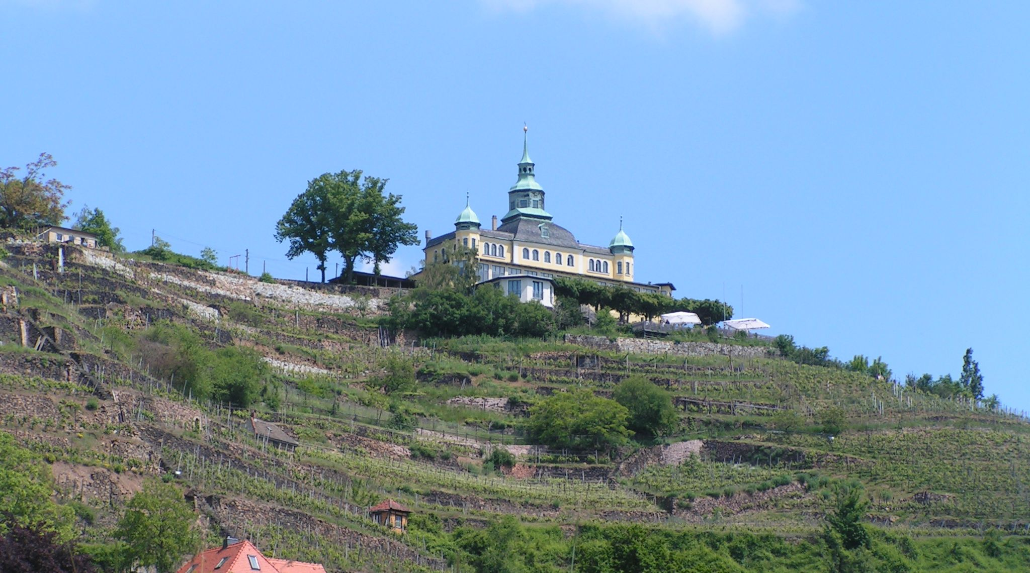 Spitzhaus, Radebeul, Sachsen, Deutschland